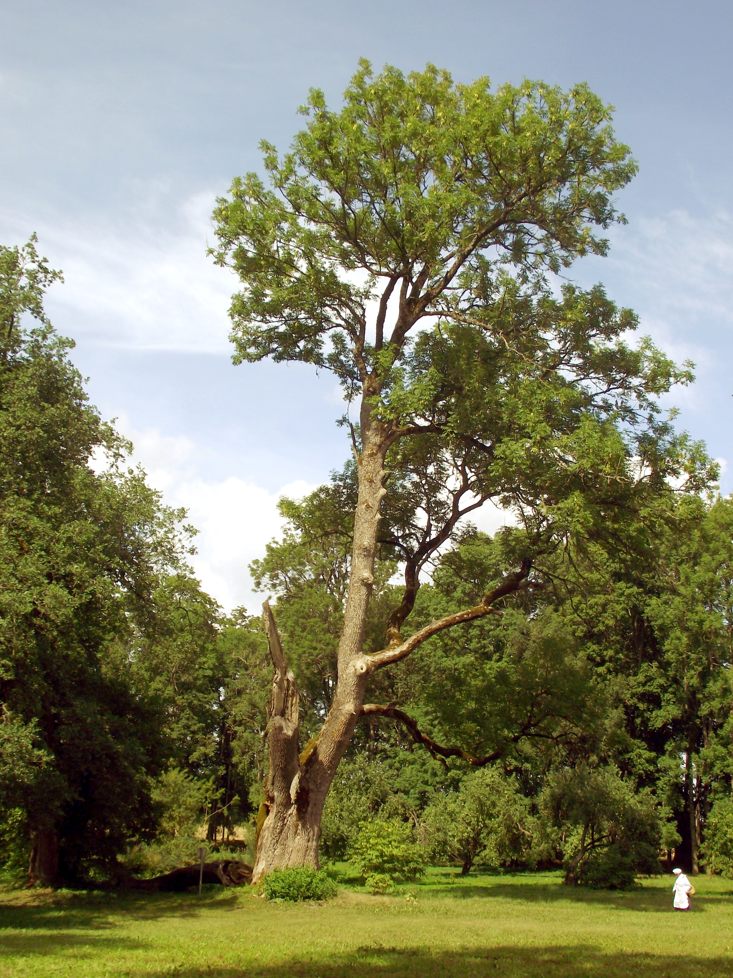 Sargvere saar Sargvere mõisapargis Järva maakonnas.